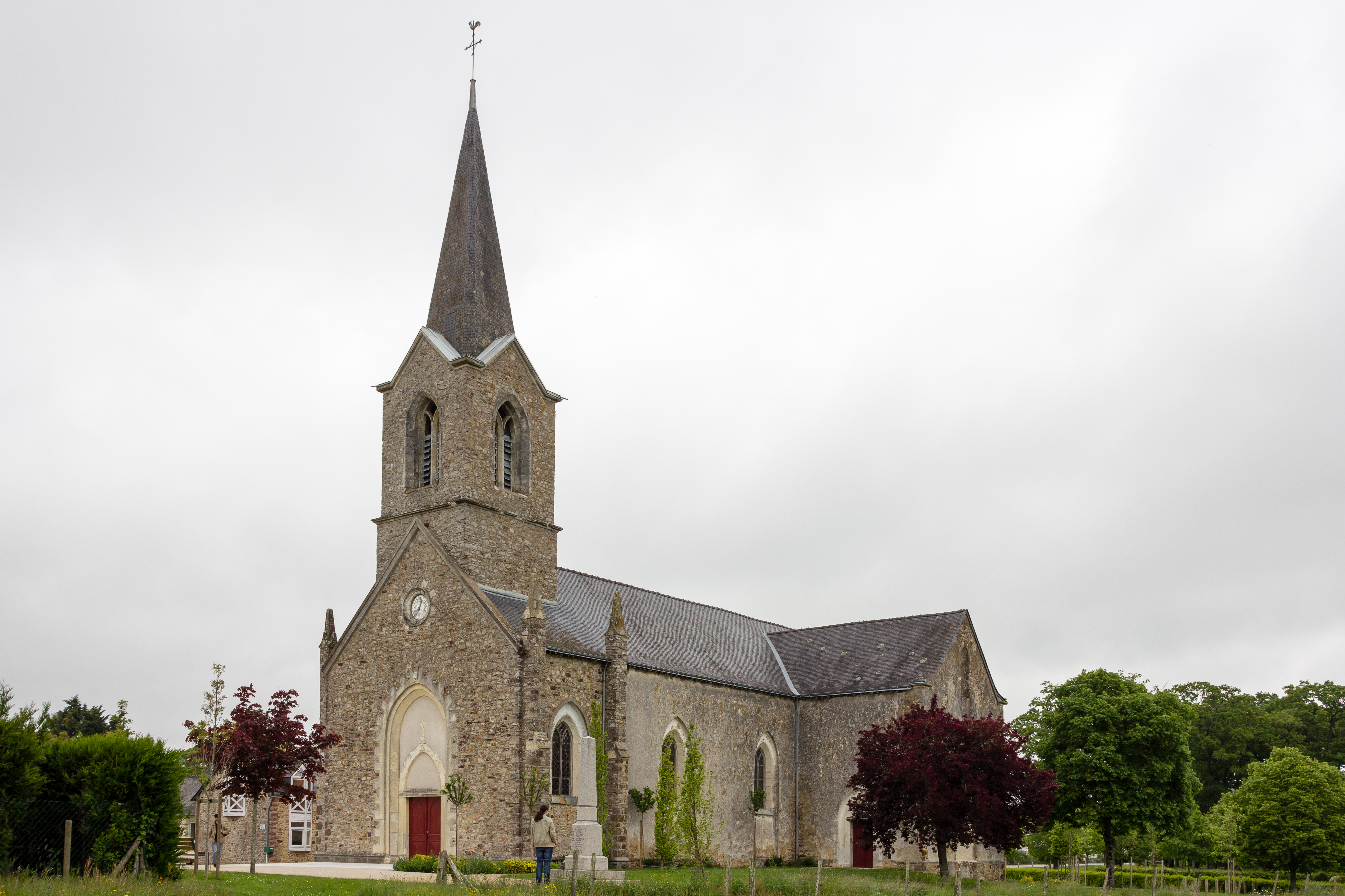 Église de l'Assomption de La Rouaudière (France).